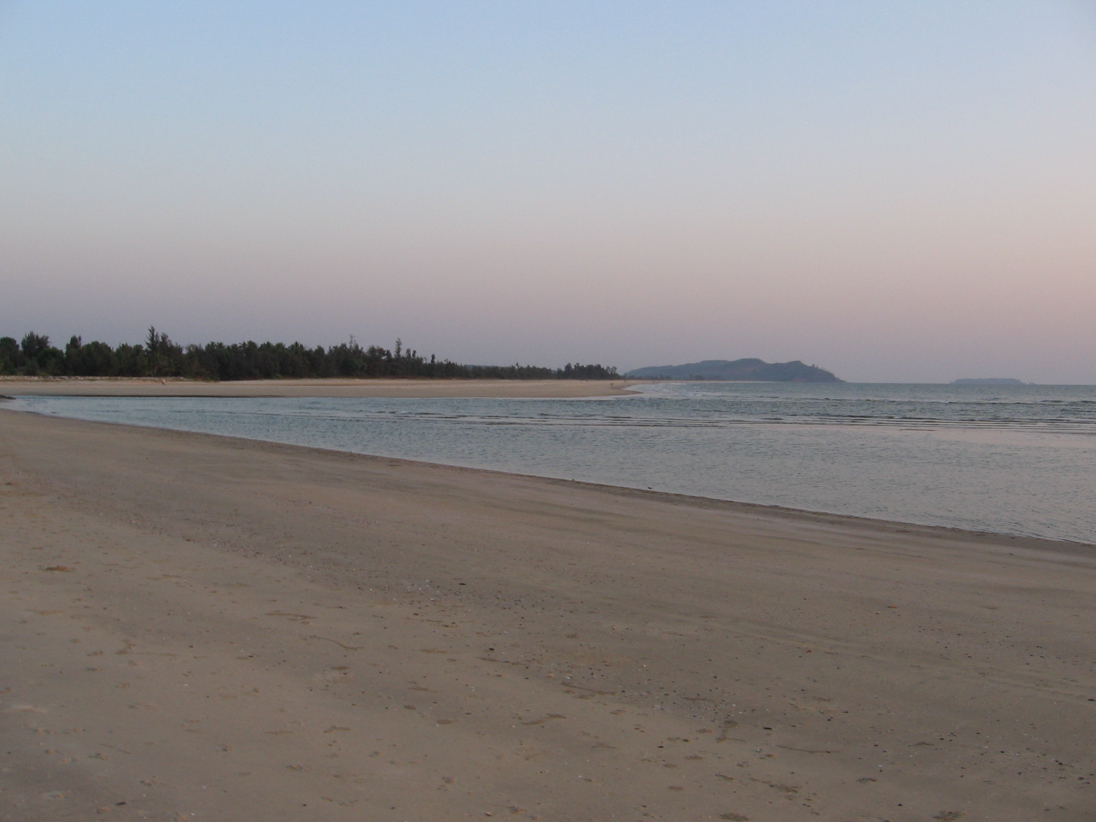 rajesh kamat.